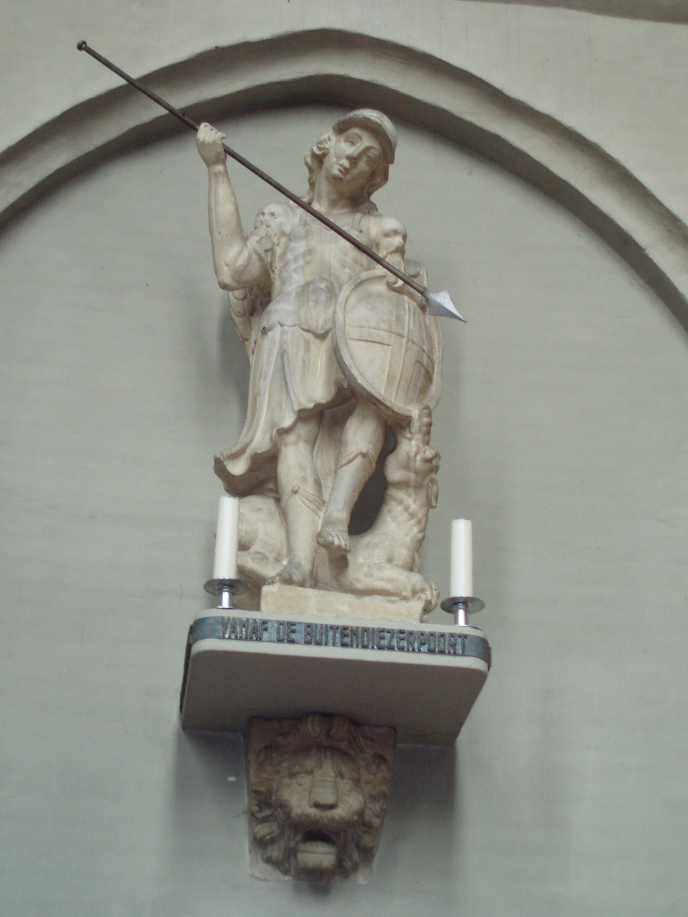 Beeld van de Aartsengel Michaël in de Basiliek van Onze Lieve Vrouwe Tenhemelopneming in Zwolle.